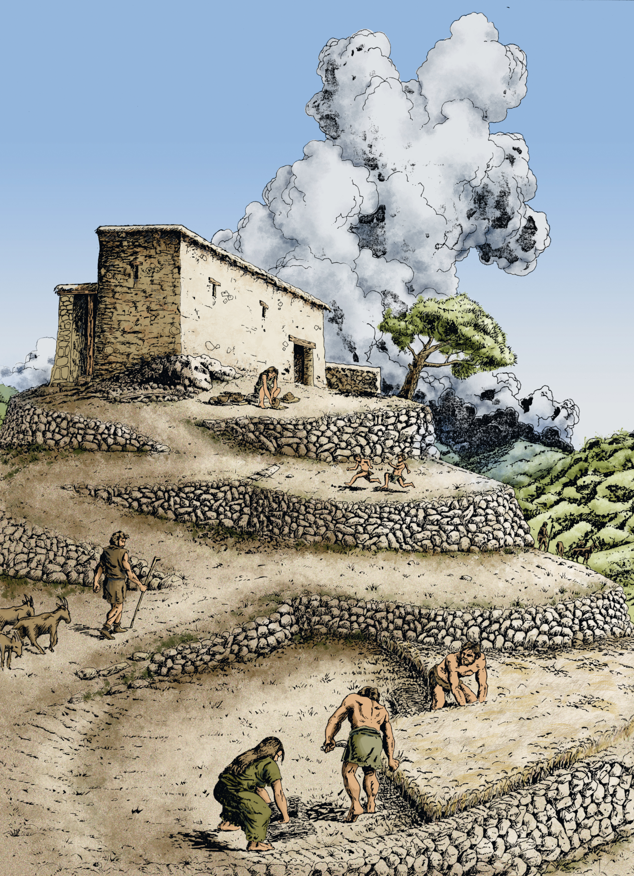 Interpretació de les restes constructives de la Lloma de Bextí. (A. Sánchez).